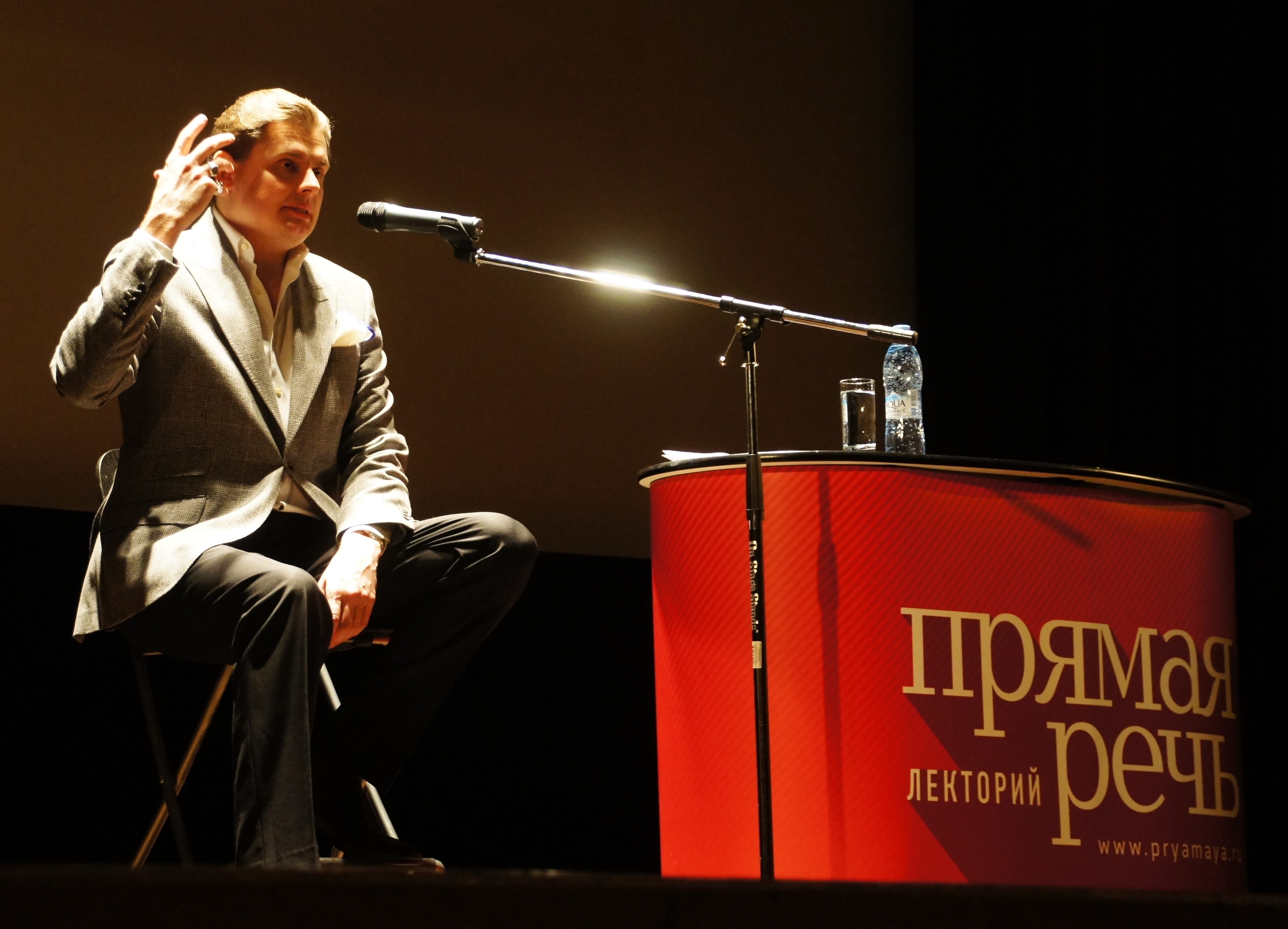 Лекция Евгения Николаевича Понасенкова в Центральном доме литераторов.